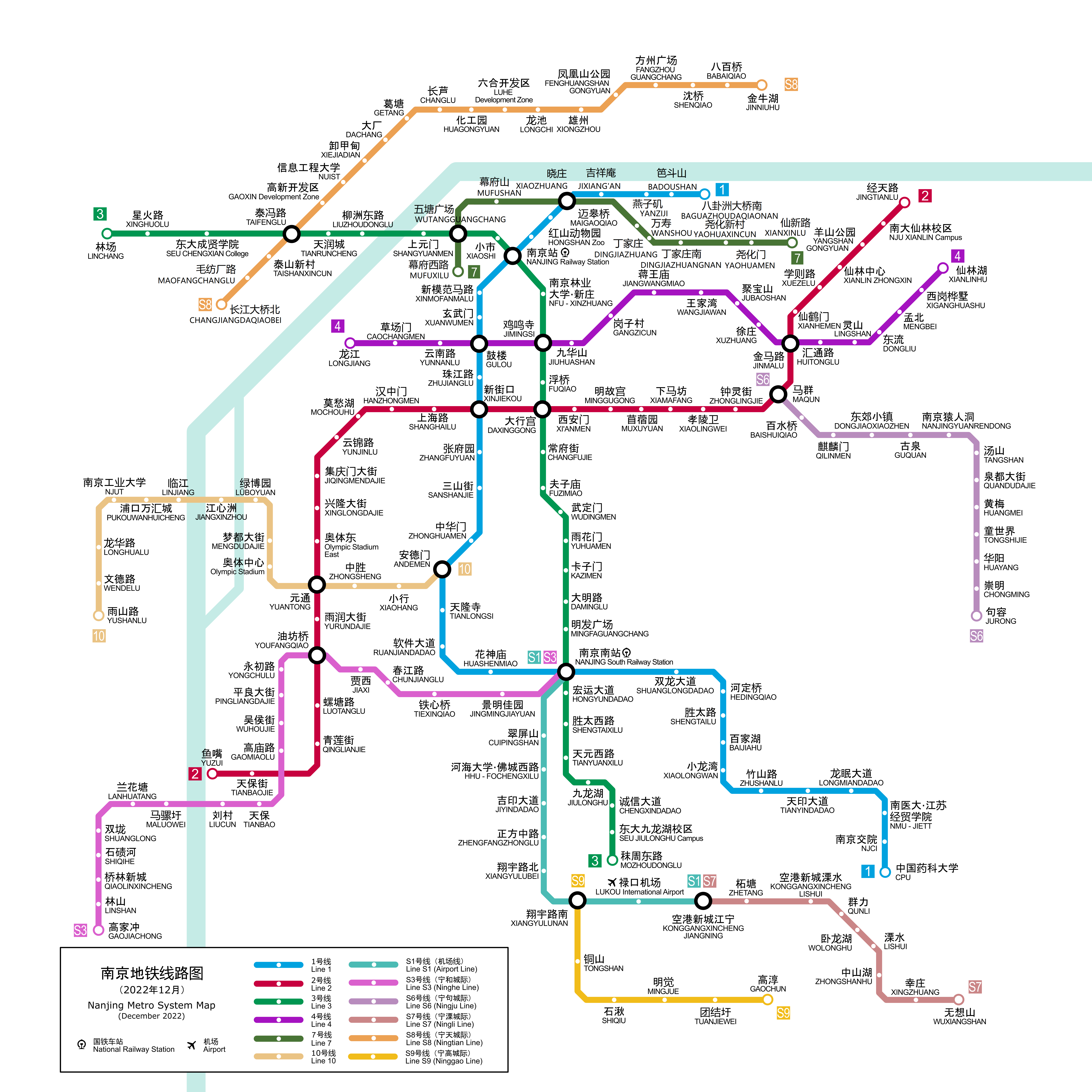 中文（中国大陆）: 南京地铁线路图（截至2018年5月28日）